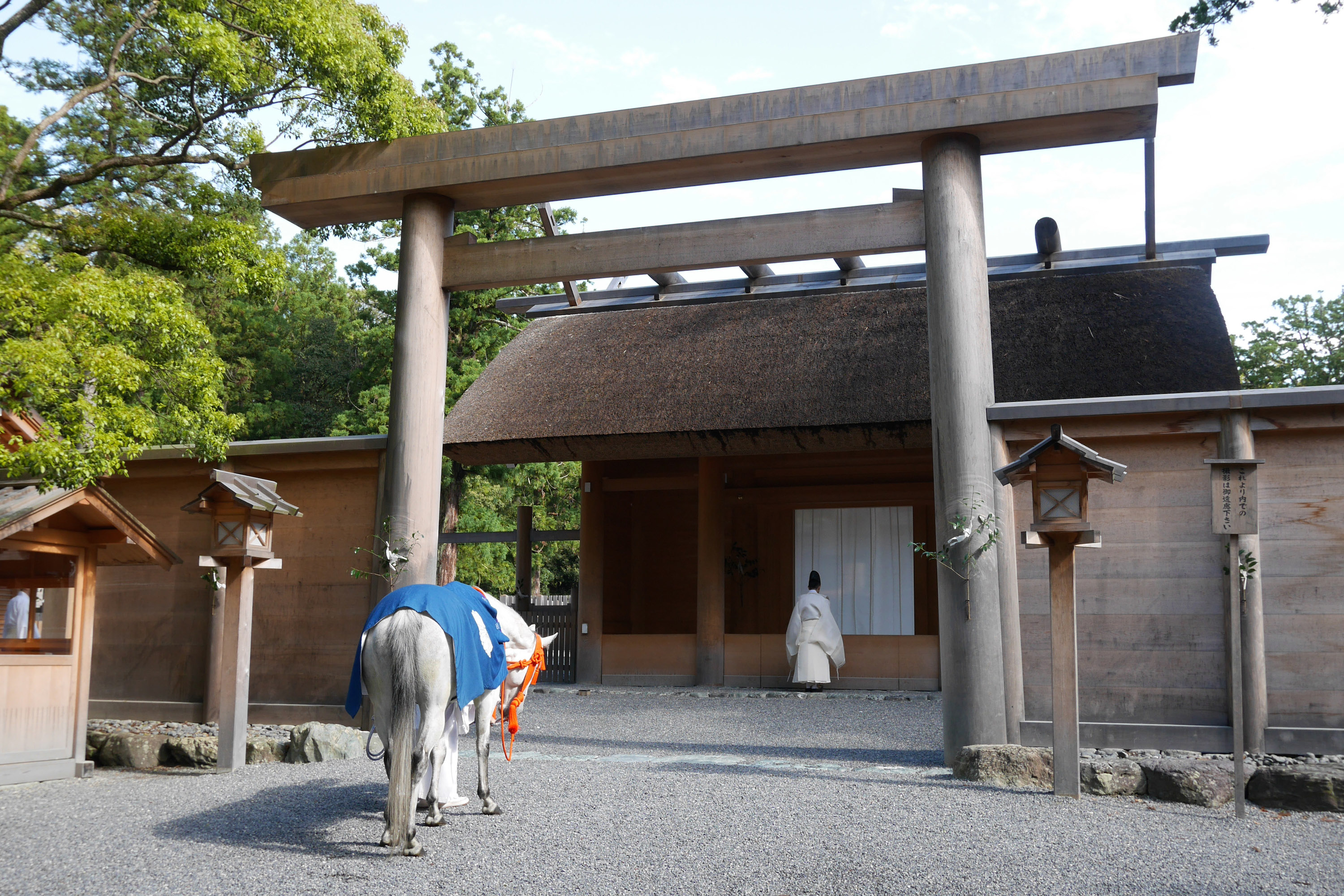 日本の三重県伊勢市豊川町にある外宮（豊受大神宮）での神馬の見参。